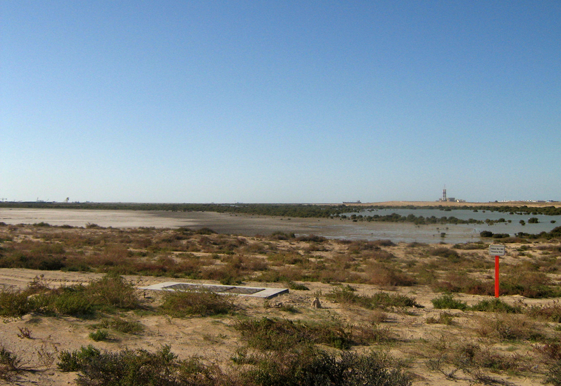 Ajman, Nature, Land, Ajman um al qauin boarder view